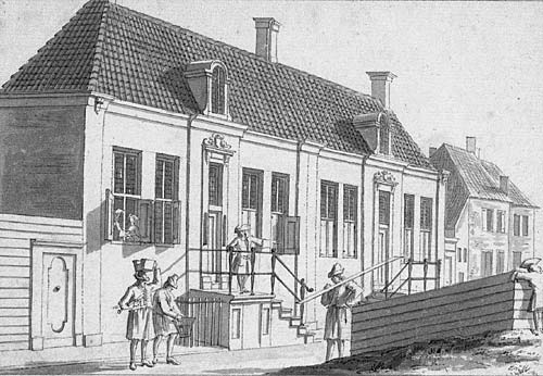 voc_oostindische_werf_1727